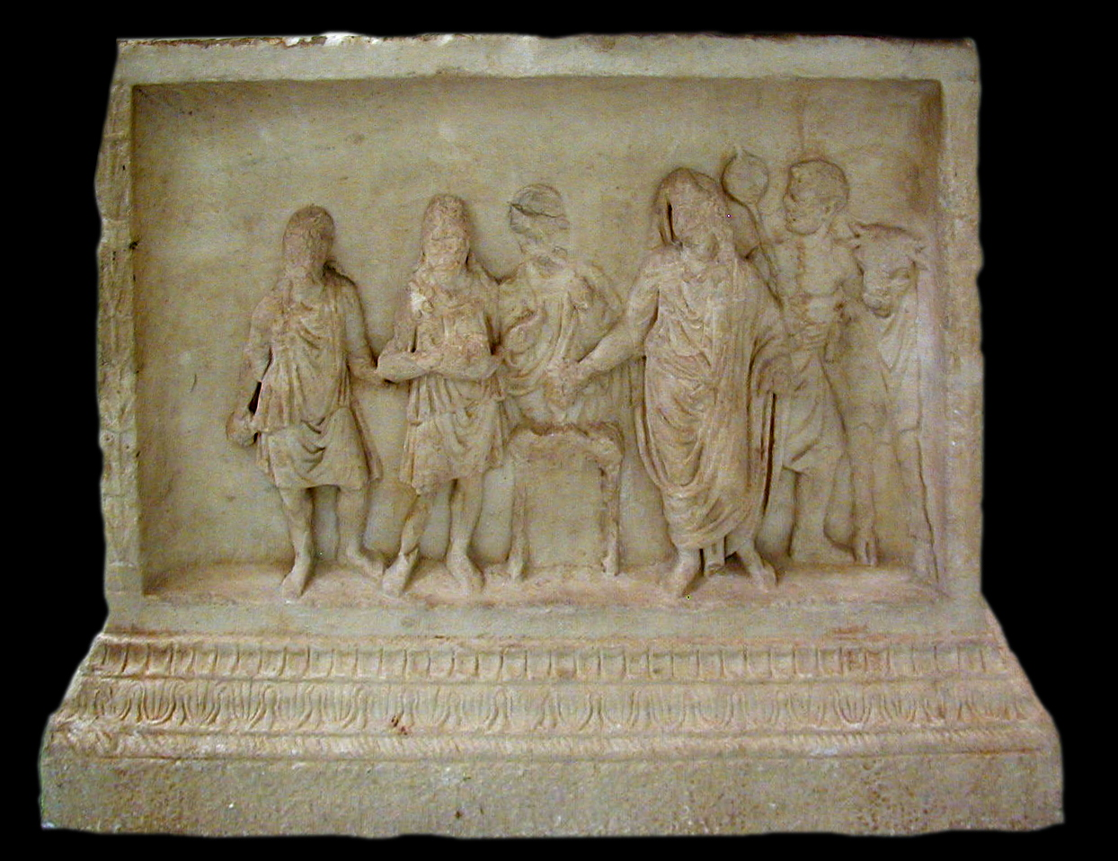 détail de l'autel de la gens augusta